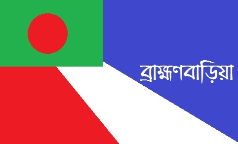 ব্রাহ্মণবাড়িয়ার ঐতিহ্যবাহী পতাকা